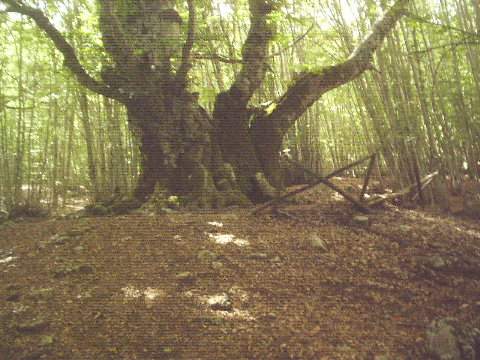 Faggio monumentale di Pantano presso Passo Godi e Villetta Barrea